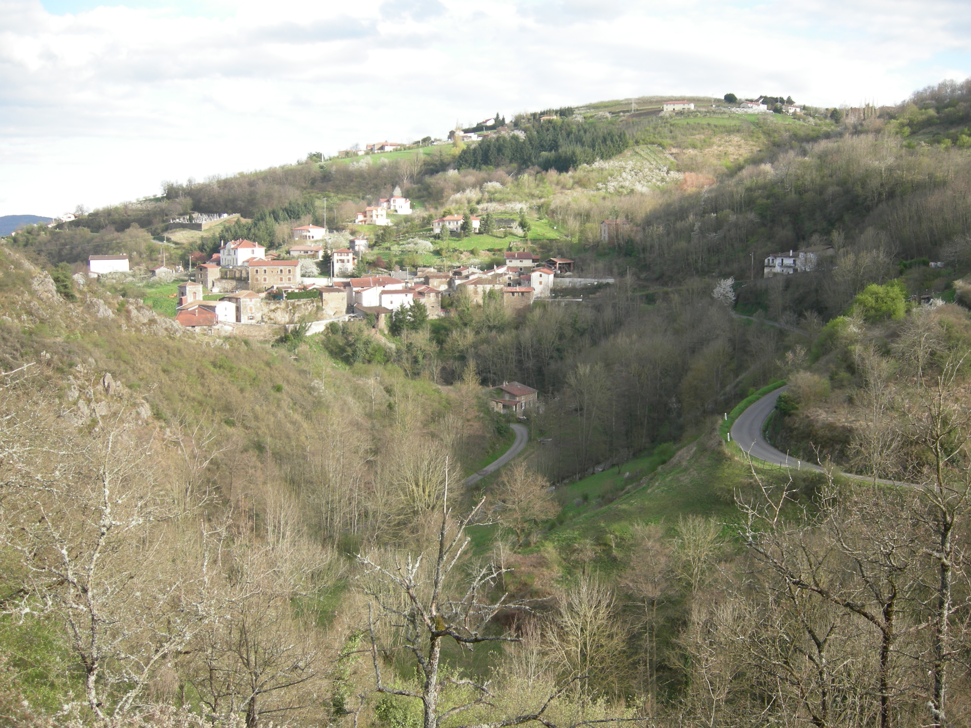 Vue sur Chagnon